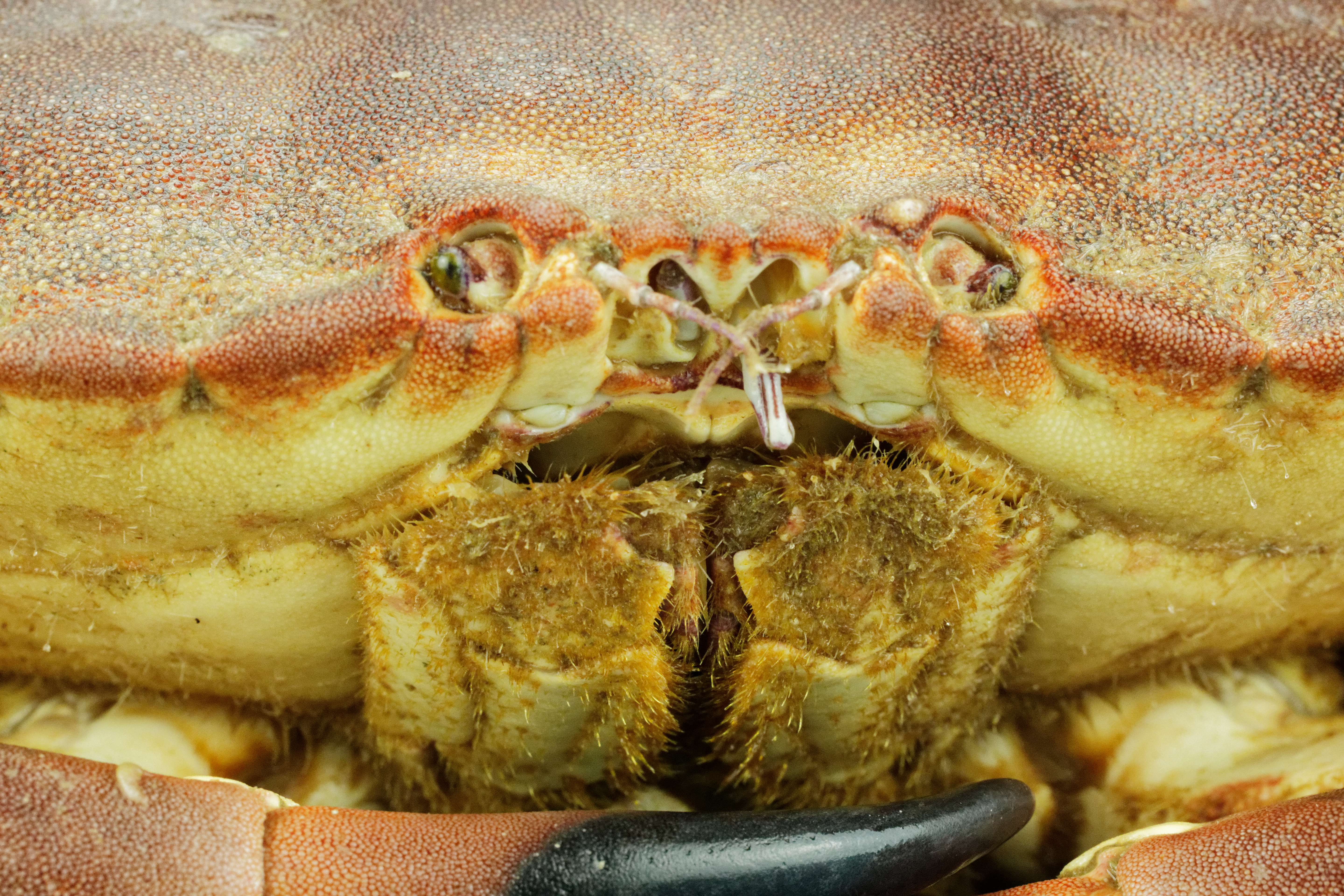 Un crabe dormeur.